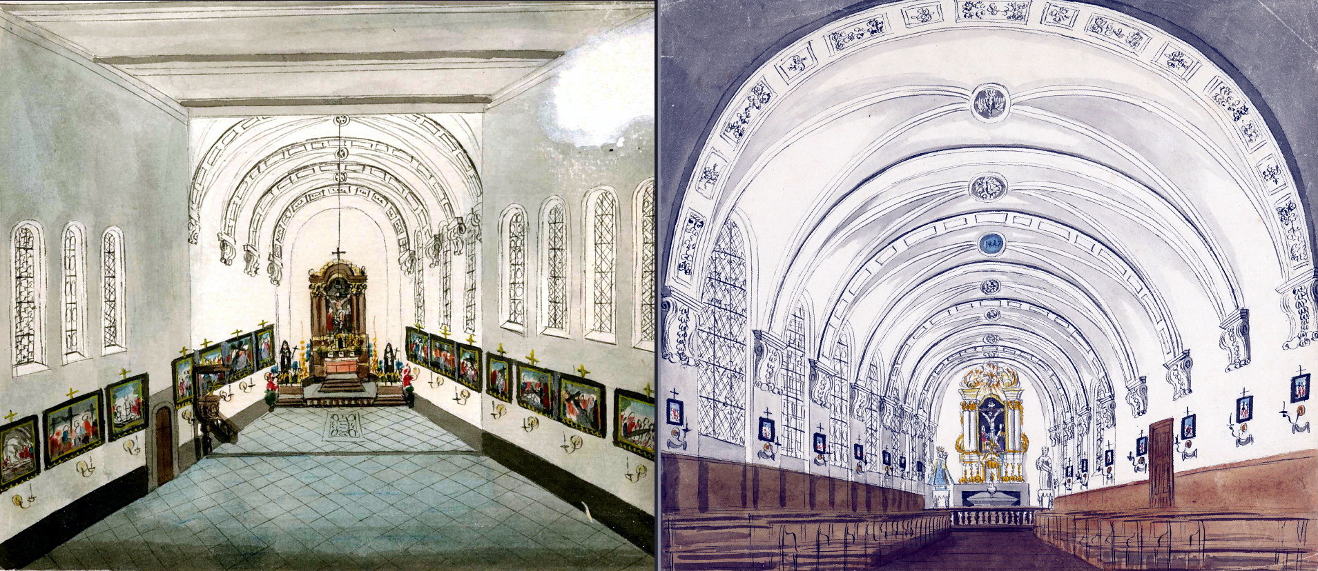 Twee tekeningen van Philippe van Gulpen van het interieur van de kloosterkapel van het vm. Calvariënbergklooster in Maastricht. Links de oorspronkelijke kapel met een gedeeltelijke scheiding tussen boven- en benedenkapel (reconstructie Van Gulpen, 1840). Rechts de opnieuw ingerichte bovenkapel in 1849. Montage van twee rechtenvrije bestanden op Wikimedia Commons: File:Kloosterkapel Calvariënberg Maastricht (Ph v Gulpen, 1840).jpg File:Maastricht, interieur kapel Calvariënbergklooster (Ph v Gulpen, 1849).jpg